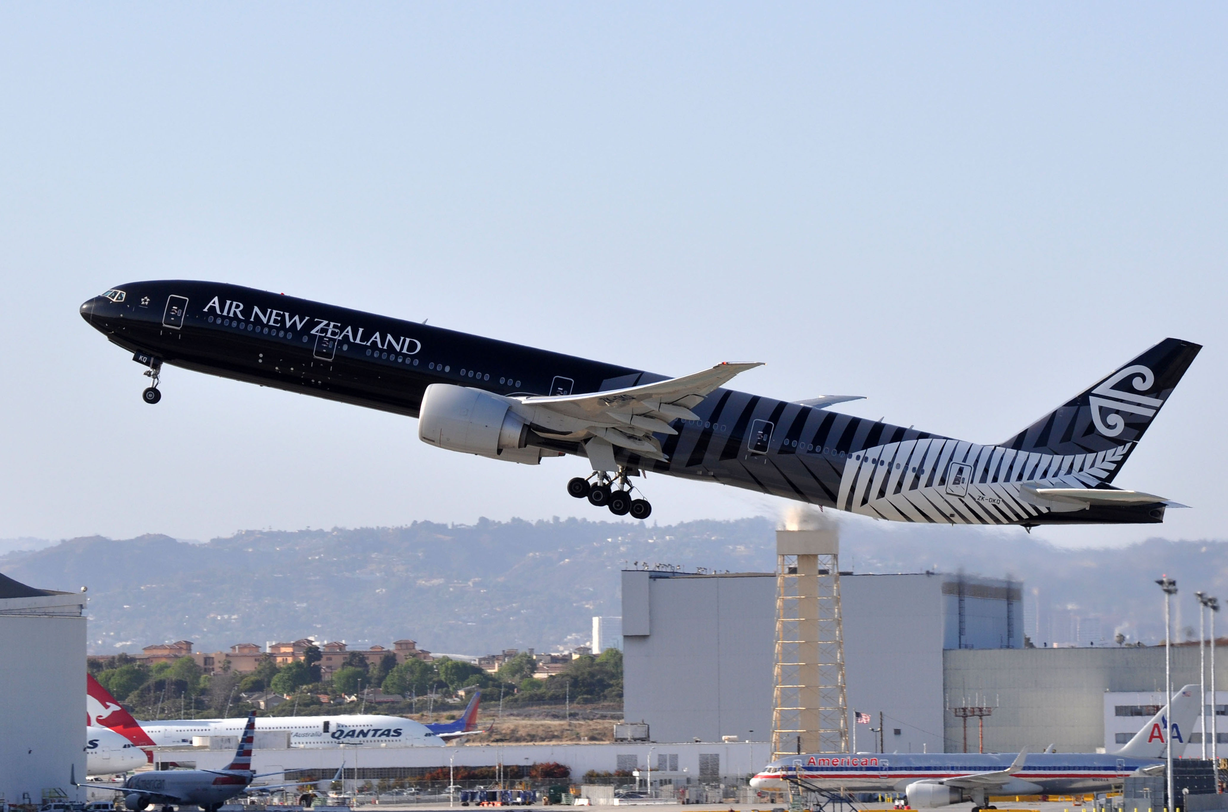 MSN 40689 LN 984 B777-319ER AIR NEW ZEALAND LAX AIRPORT